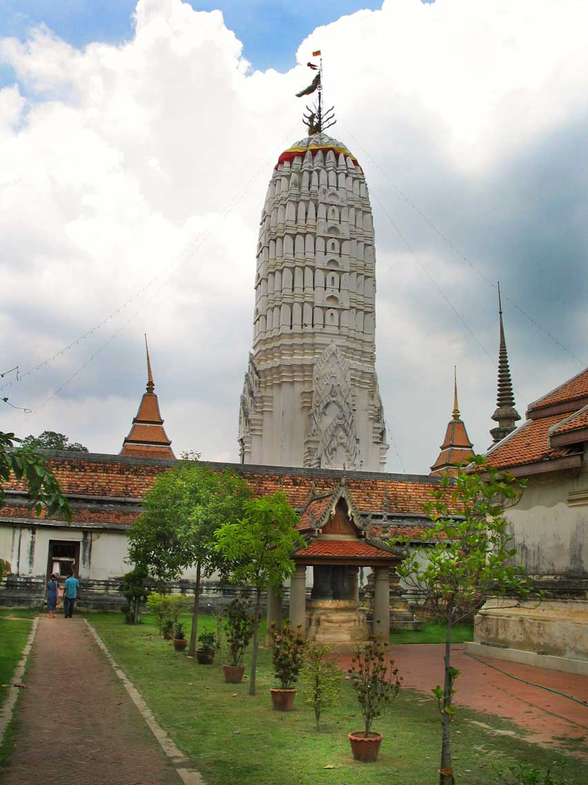 Wat Putthai Sawan, Ayutthaya, Thailand.